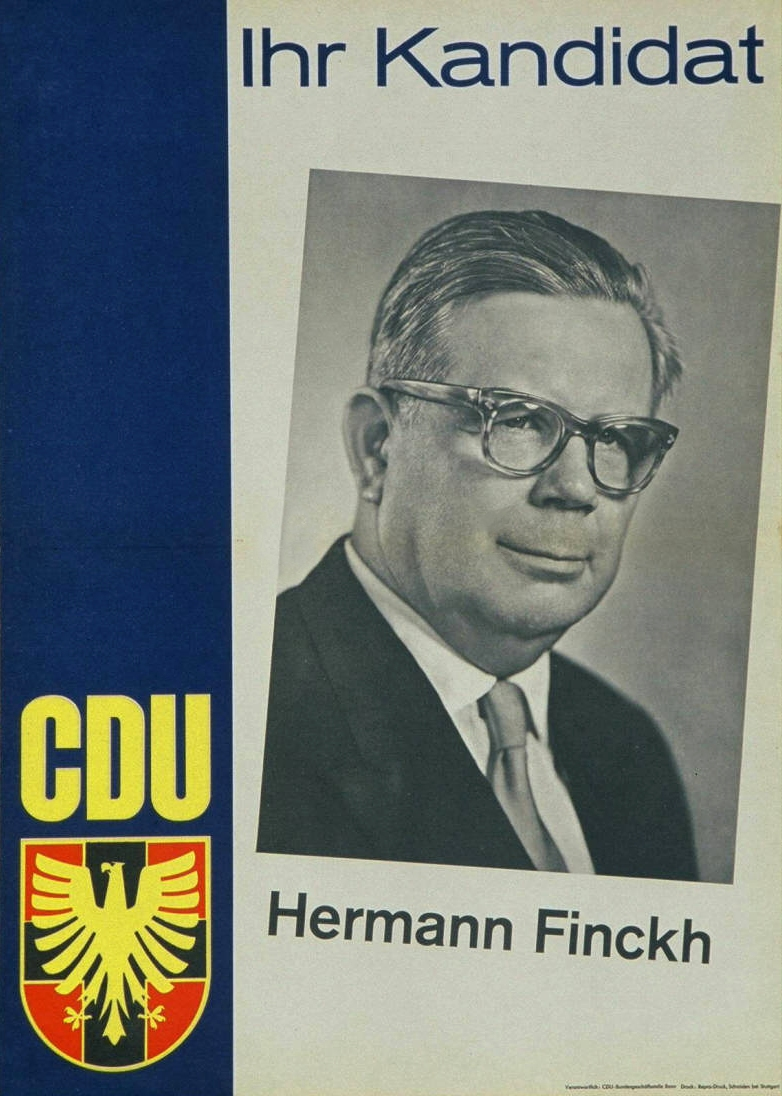 Ihr Kandidat Abbildung: Porträtfoto Plakatart: Kandidaten-/Personenplakat mit Porträt Auftraggeber: Verantw.: CDU-Bundesgeschäftsstelle Bonn Drucker_Druckart_Druckort: Repro-Druck, Schmiden bei Stuttgart Objekt-Signatur: 10-001: 1099/8 Bestand: Plakate zu Bundestagswahlen (10-001) GliederungBestand10-18: Plakate zu Bundestagswahlen (10-001) » Die 4. Bundestagswahl am 17. September 1961 » CDU » Mit Porträtfoto Lizenz: KAS/ACDP 10-001: 1099/8 CC-BY-SA 3.0 DE